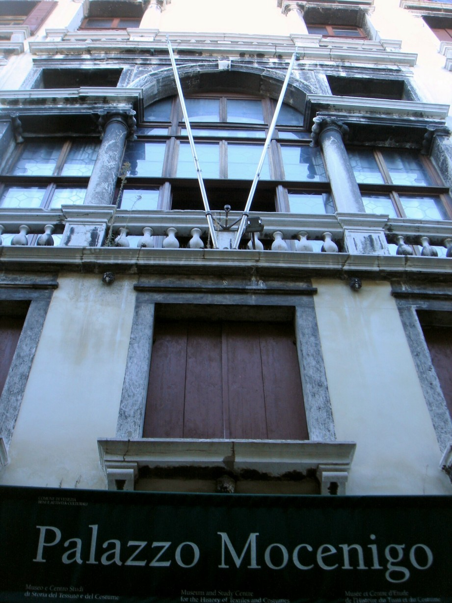 Venezia: Palazzo Mocenigo di Santa Croce, presso San Stae.